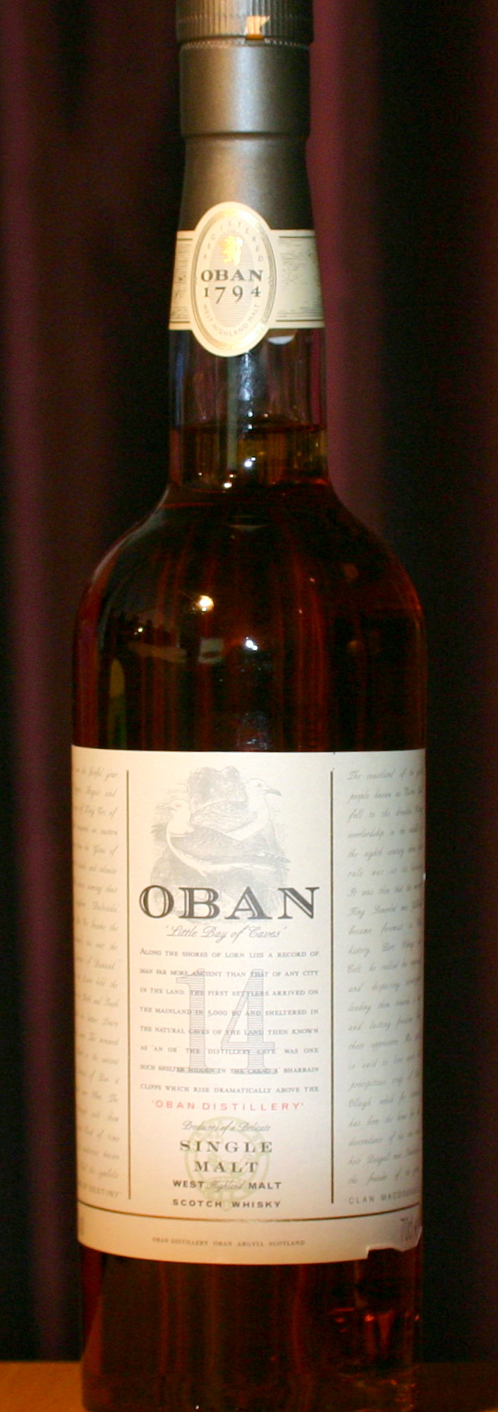 Oban Single Malt Whisky 14 years old